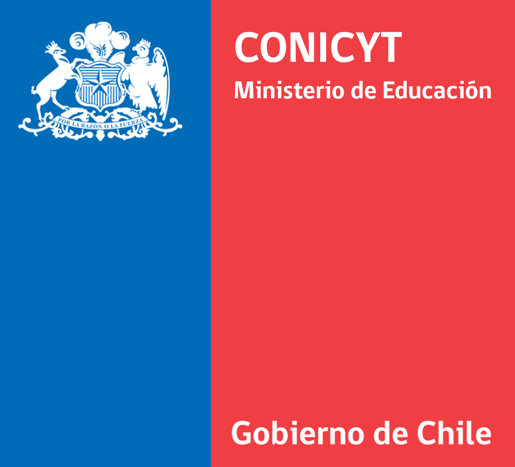 Logo de la Comisión Nacional de Investigación Científica y Tecnológica.